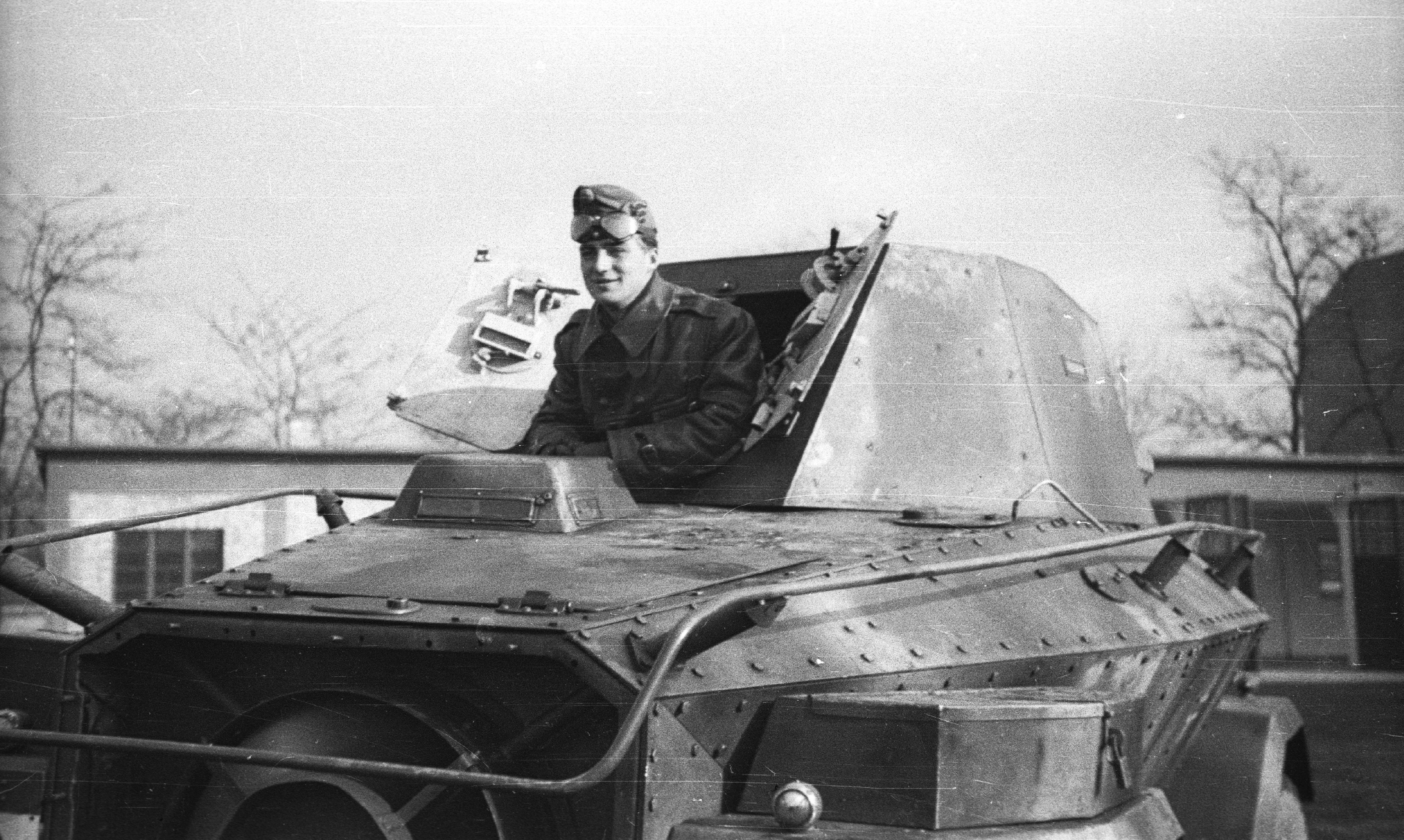 Orczy-kert, Ludovika garázsok. Straussler AC2 páncélautó hátulja. Location: Hungary, Budapest VIII. Tags: armoured car, military, Nicolaus Straussler-design, Budapest Title: Orczy-kert, Ludovika garázsok. Straussler AC2 páncélautó hátulja.